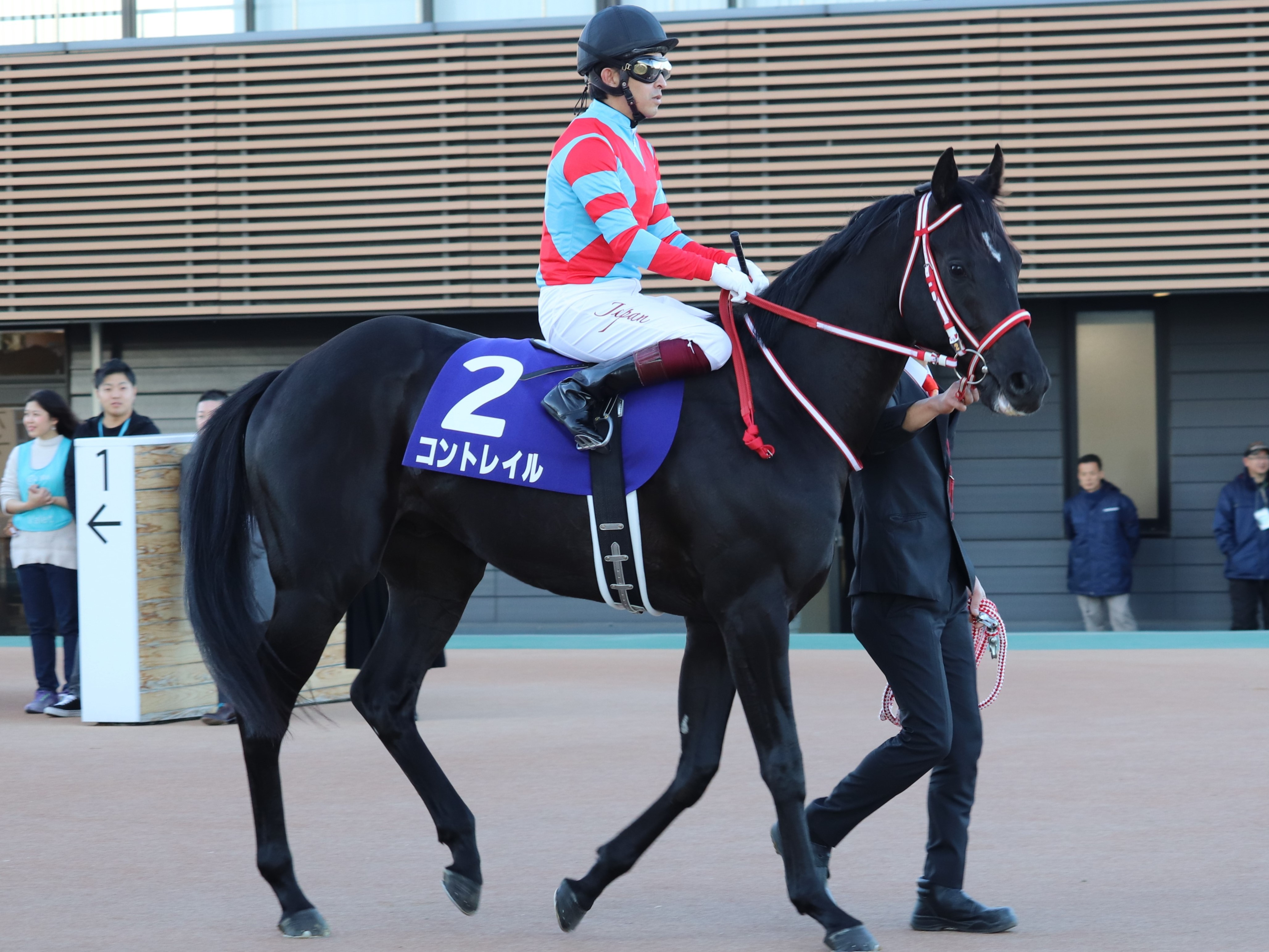 ホープフルステークスで本馬場入場するコントレイル（鞍上:福永祐一）